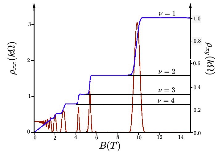 Comportamiento cuántico de la resistividad